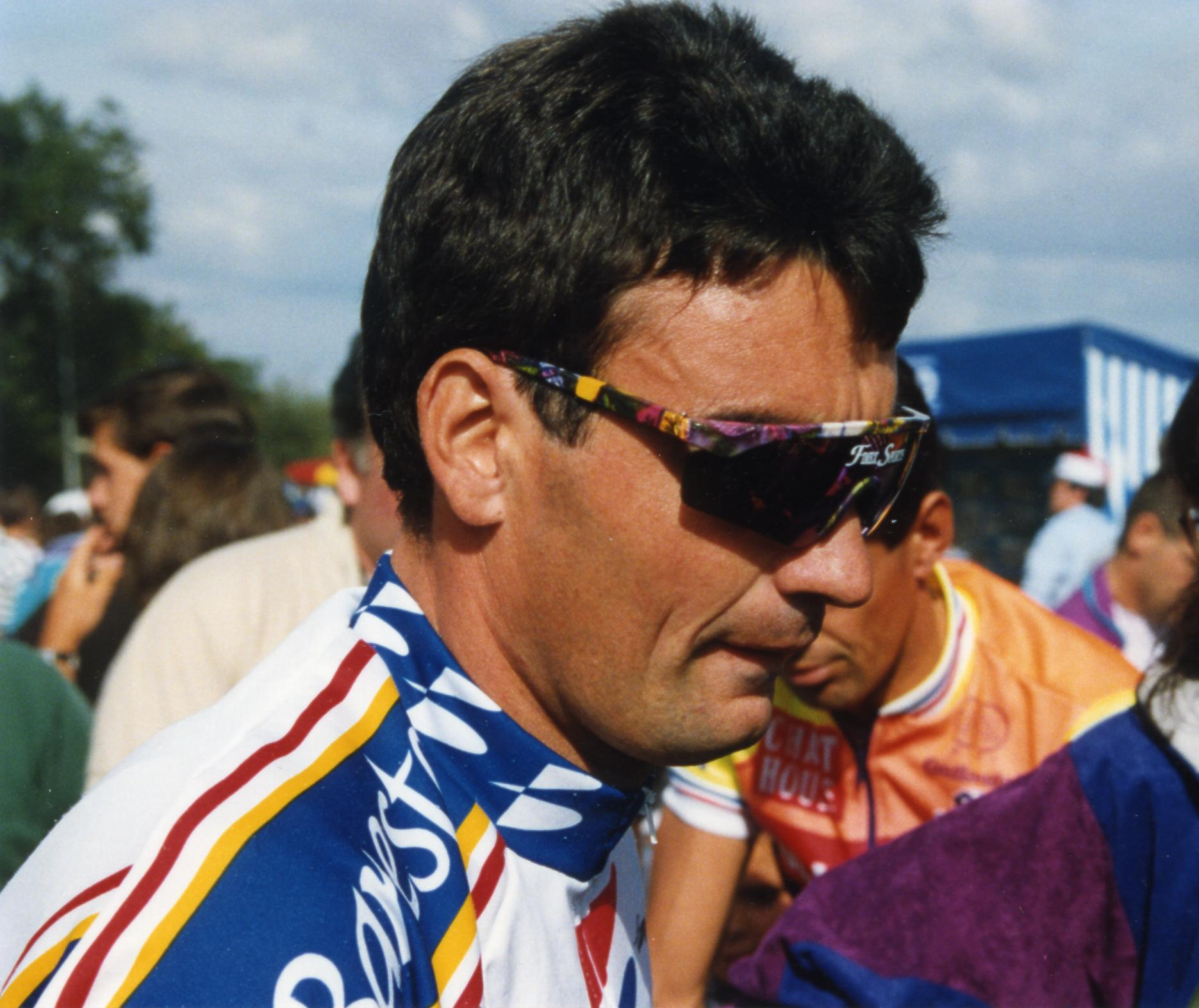 Critèrium de LEVES